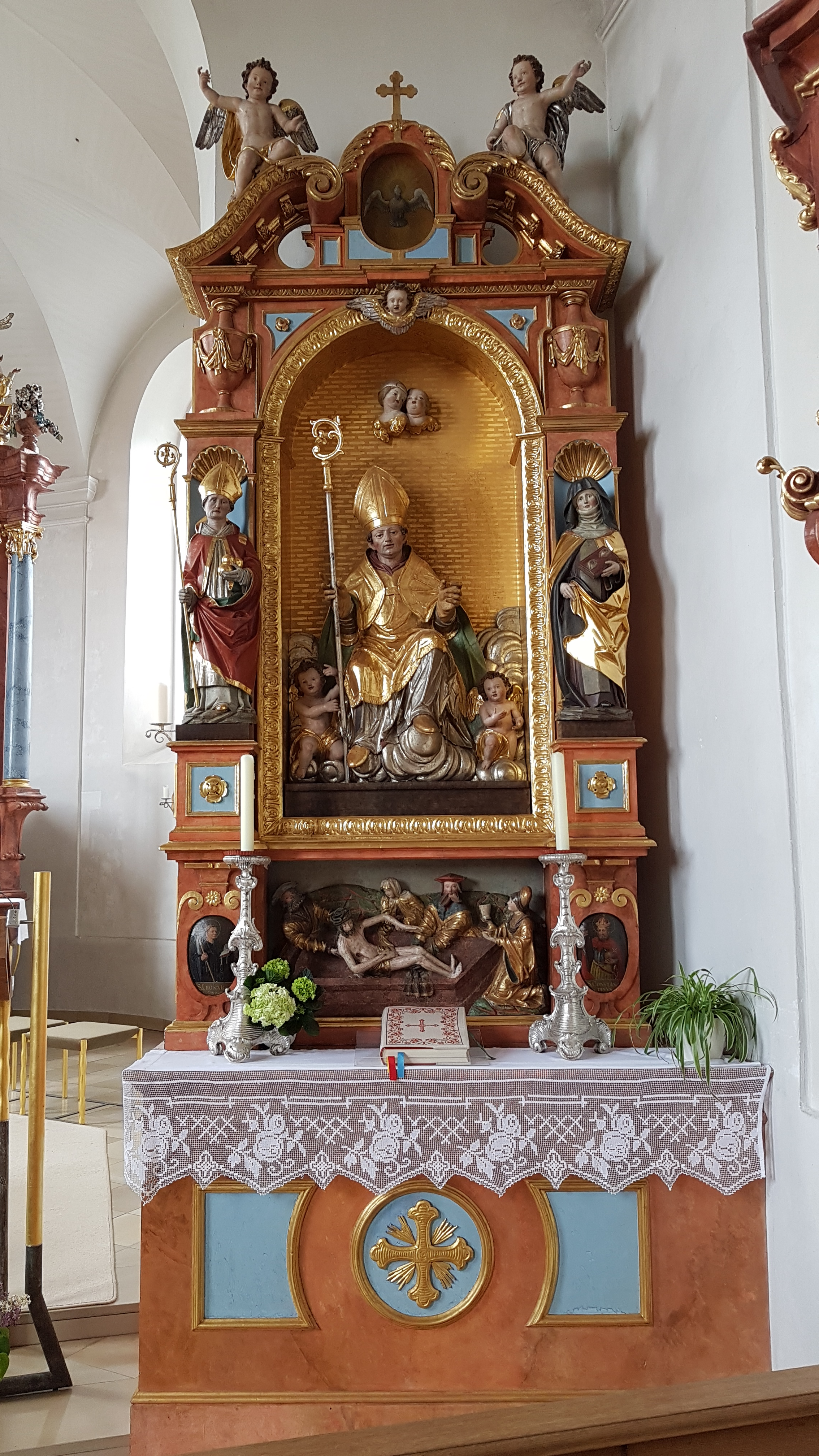 St. Ulrich (Wangen bei Starnberg)